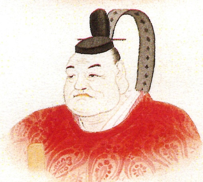 板倉勝政の肖像。